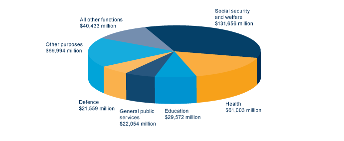 བོད་ཡིག: แผนภาพแสดงค่าใช้จ่ายรัฐบาลออสเตรเลียปี 2012